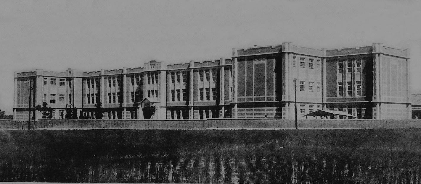 中文（台灣）: 台中師範學校